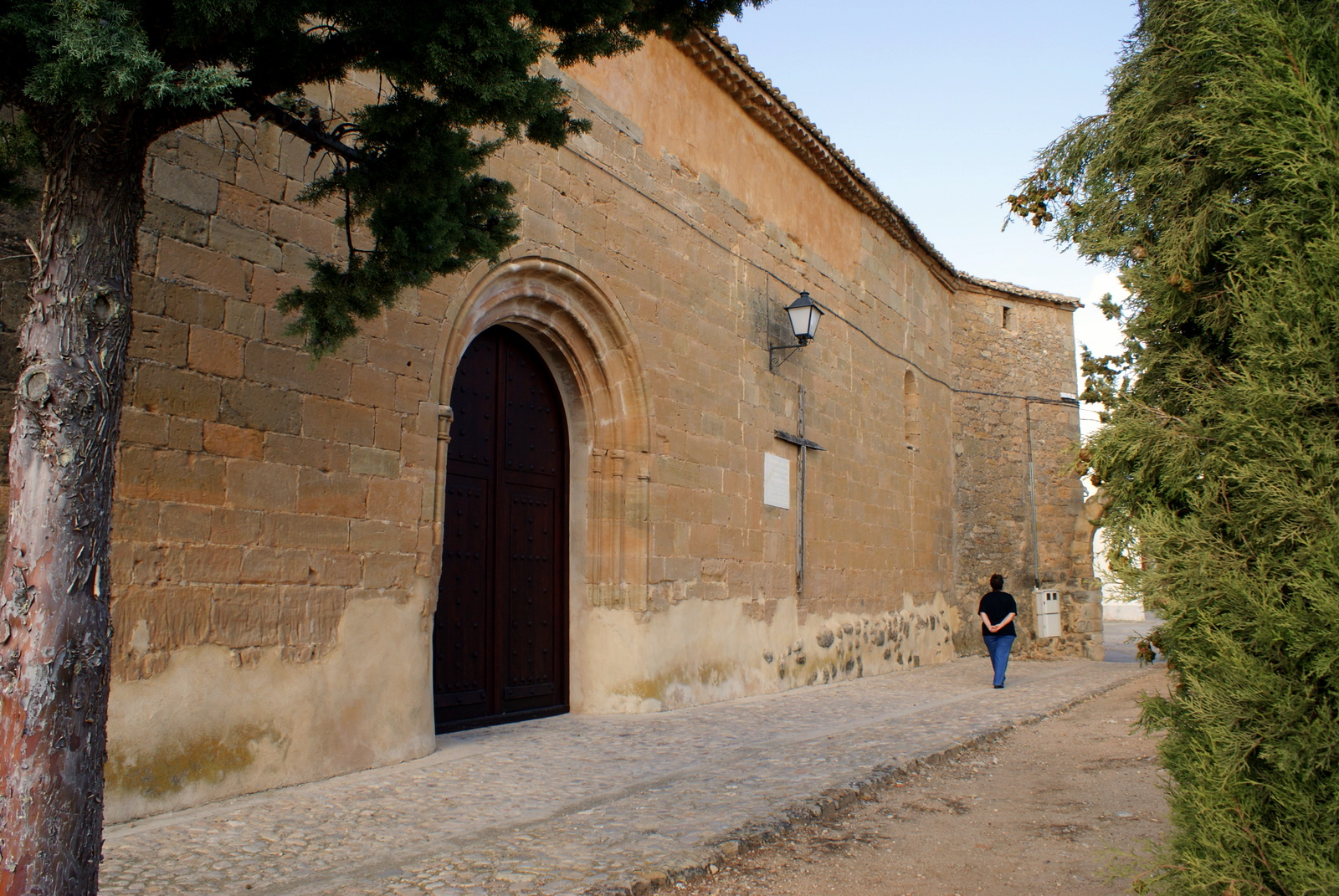 Fachada sur, en el recinto ajardinado de la iglesia, S. XVI. Albendea, Cuenca, Castilla-La Mancha